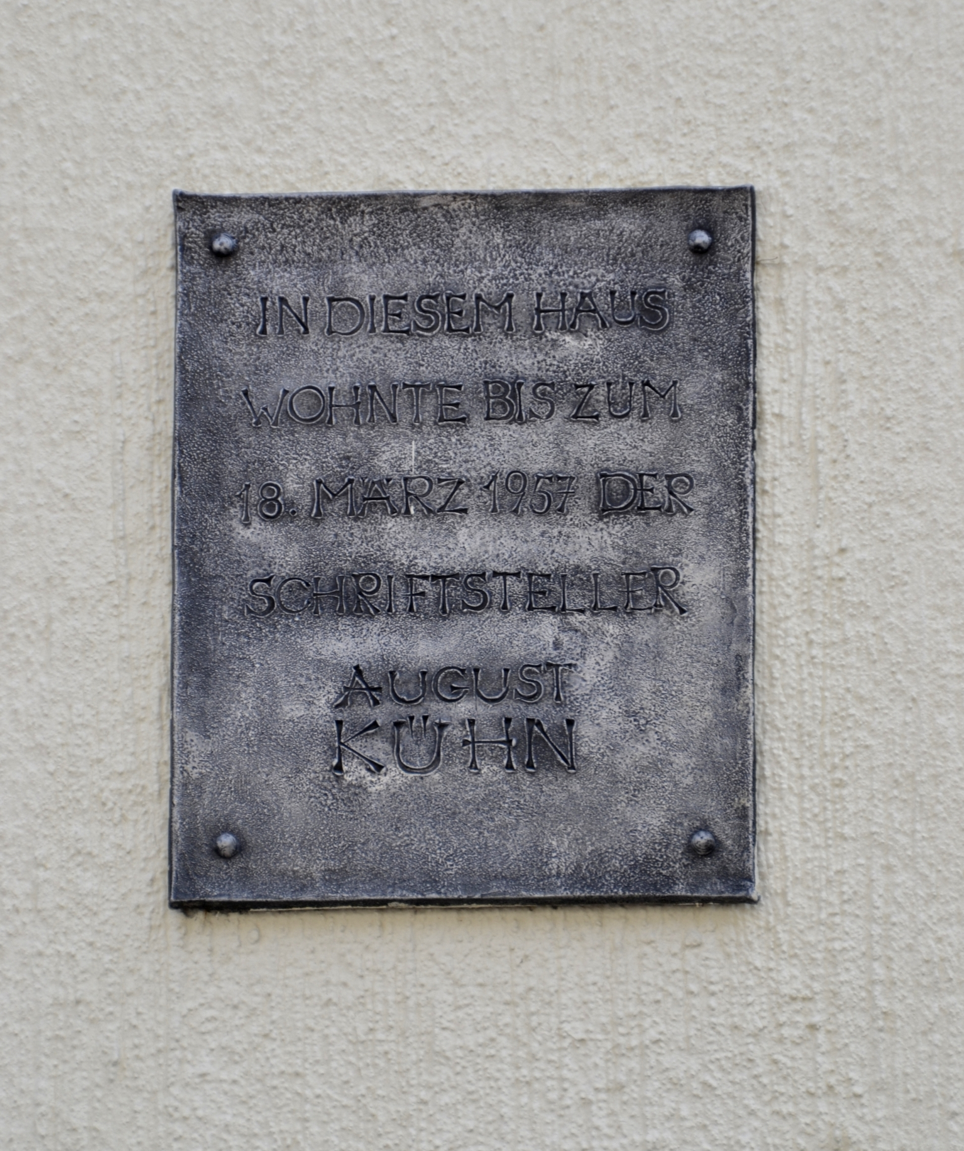 Gedenktafel an August Kühn an der Außenfassade der Wohnanlage Gollierstraße 41-41 a-43-45-45 a-45 b-45c-47-49-49 a-49 b-49 c-51-53-53 a, München, Schwanthalerhöhe.